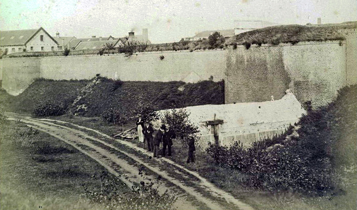 Veldzijde van de Lindenkruispoort, gefotografeerd door Theodor Weijnen in 1874, kort voor de sloop, voor de uitgave Geslechte Vestingwerken van Maastricht. Originele titel foto: "Walmuur bij Bastion Lindenkruis" (opmerking: nr in marge).